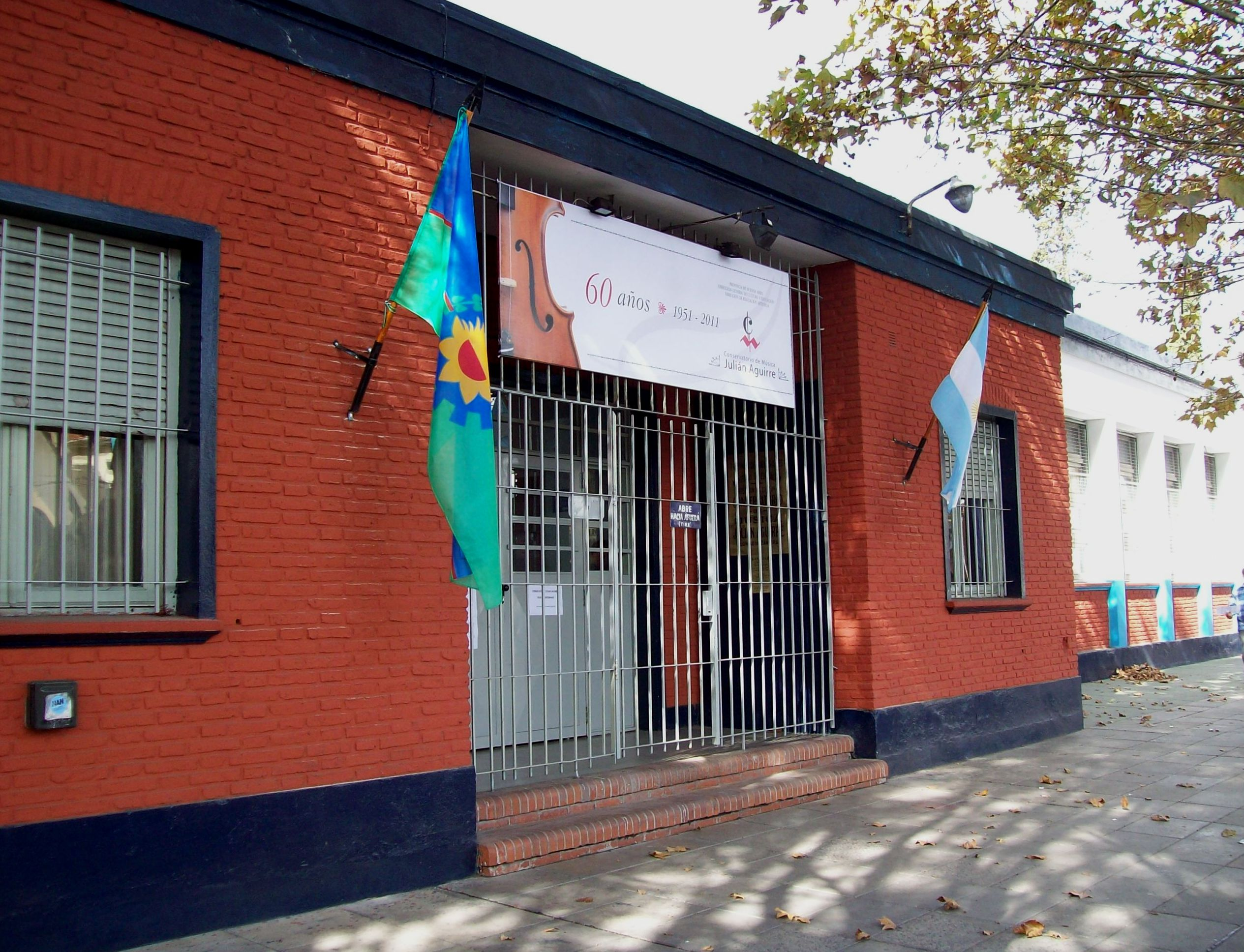 Institución musical fundada por Alberto Ginastera y dedicada a la formación de músicos y docentes de música.